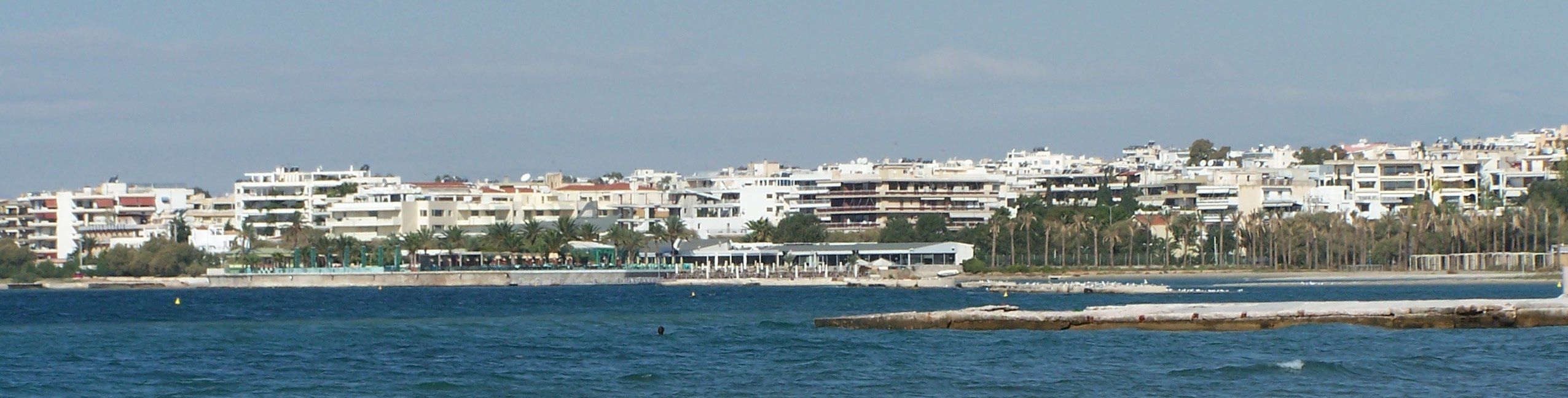 Voula, Greece Seaside copyright Niels Elgaard Larsen, User:Elgaard